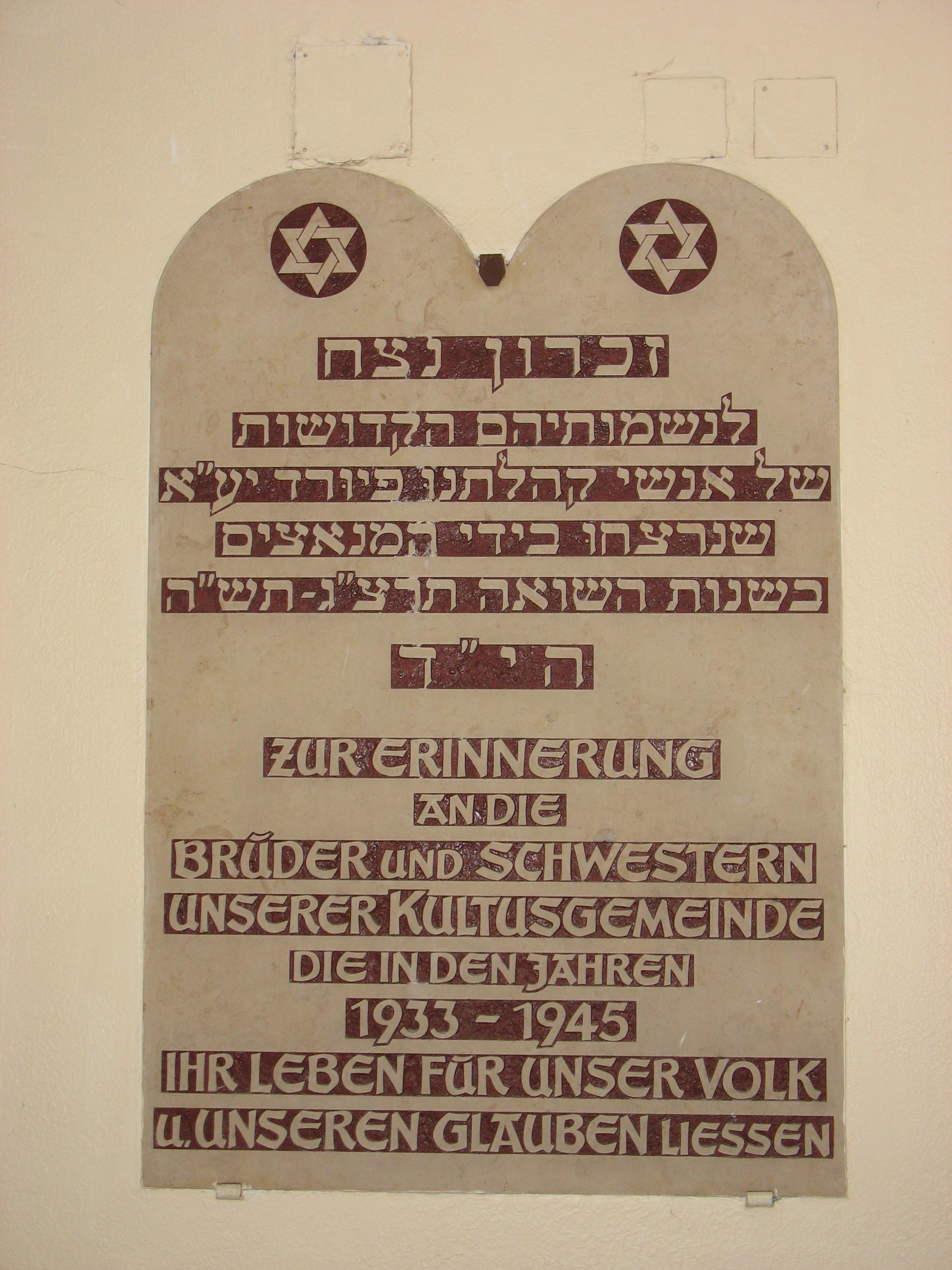 Gedenktafel der jüdischen Shoa-Opfer in der ehemaligen Jüdischen Realschule